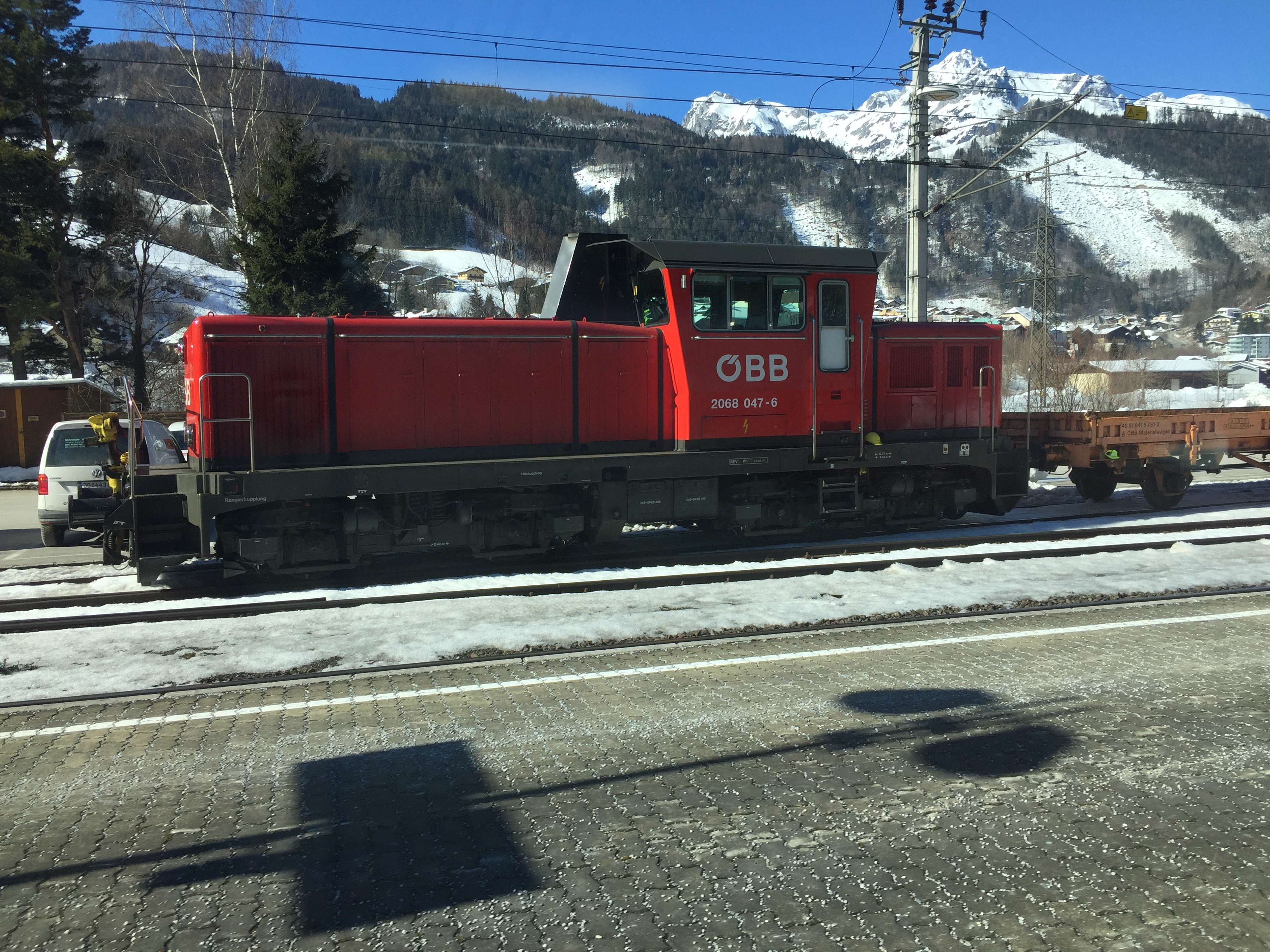 ÖBB 2068 047-6 am Bahnhof Werfen, 18. Februar 2019